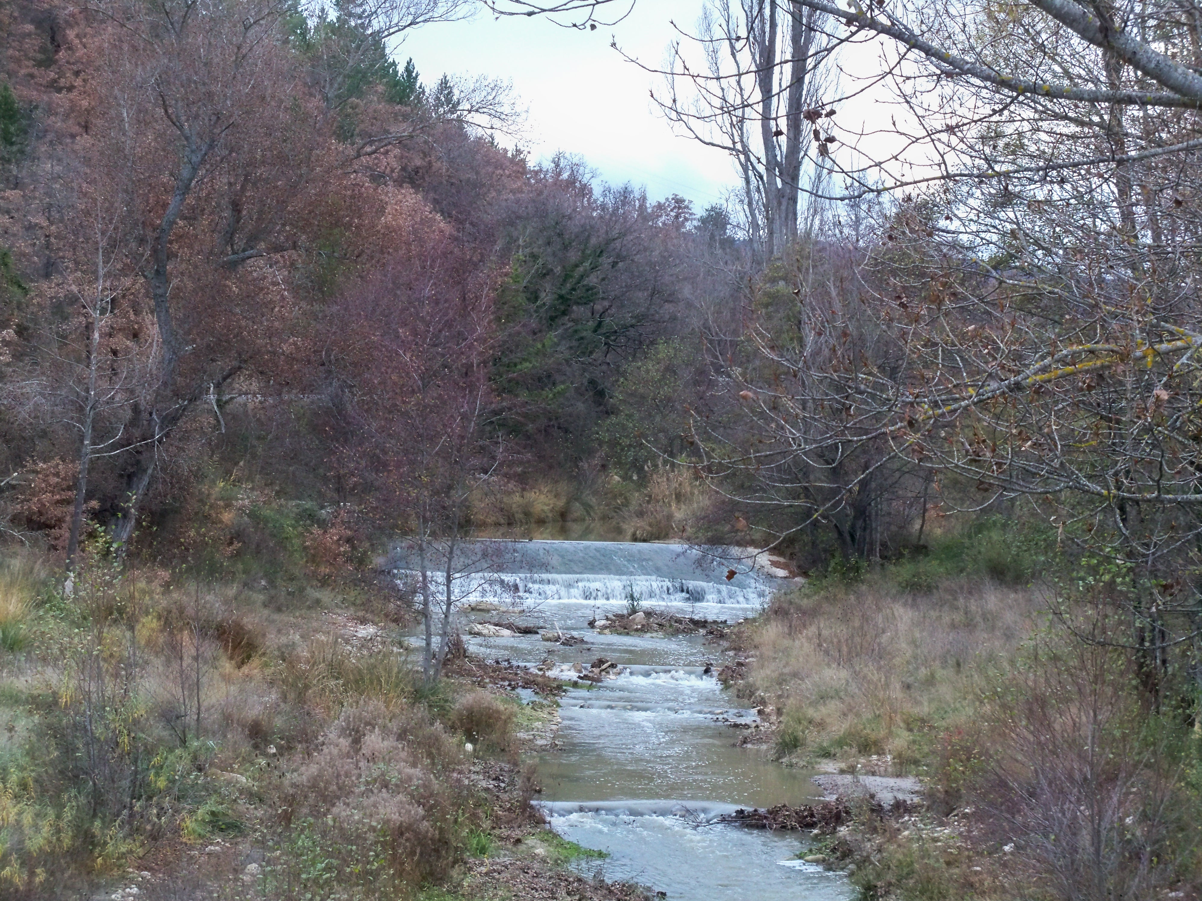 le Calavon près de Sainte-Croix-à-Lauze (04)